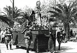 Costaleros del Mayor Dolor del Nazareno de Linares en los años 50